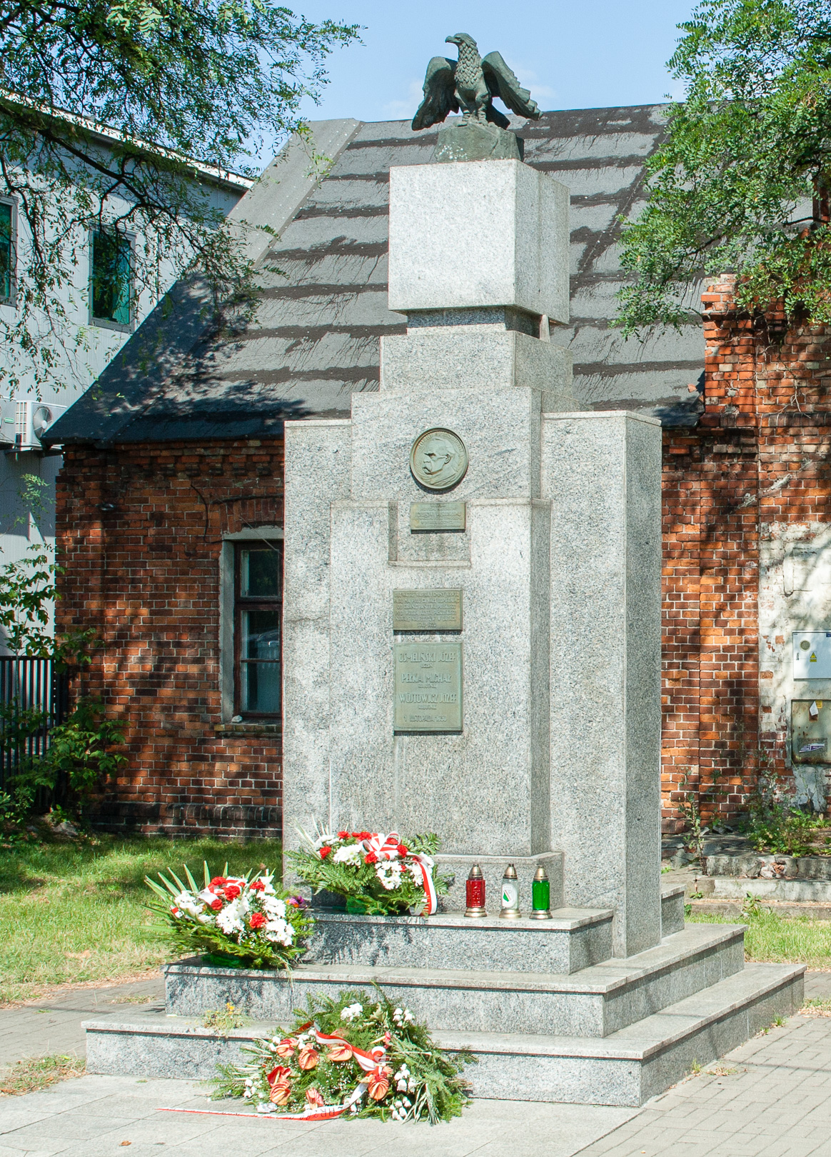 Pomnik poświęcony pamięci Józefa Piłsudskiego oraz poległych w obronie ojczyzny w latach 1918-1920. W tle budynek dawnej "Murowanki". Napisy: Wokół profilu Piłsudskiego: JÓZEF PIŁSUDSKI Najwyższa tablica ROK 1930 PIERWSZEMU MARSZAŁKOWI JÓZEFOWI PIŁSUDSKIEMU BUDOWNICZEMU POLSKI ODRODZONEJ W DZIESIĄTĄ ROCZNICĘ WYZWOLENIA OJCZYZNY OD NAJAZDU BOLSZEWICKIEGO Środkowa tablica: OBYWATELE WAWRA I GMINY WAWER PADLI NA POLU CHWAŁY ODPIERAJĄC OD GRANIC PAŃSTWA POLSKIEGO POD WODZĄ JÓZEFA PIŁSUDSKIEGO NAWAŁĘ NAJEŹDŹCÓW W LATACH 1918-1920 Dolna tablica: OSMELIŃSKI JÓZEF UCZEŃ PEŁKA MICHAŁ ROBOTNIK WÓJTOWICZ JÓZEF ROBOTNIK 1 LISTOPADA 1930 Lokalizacja: okolica ul.Płowiecka 77 w Warszawie (w Wawrze)